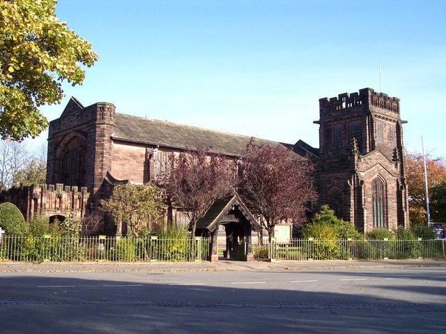 Christ church in Port Sunlight